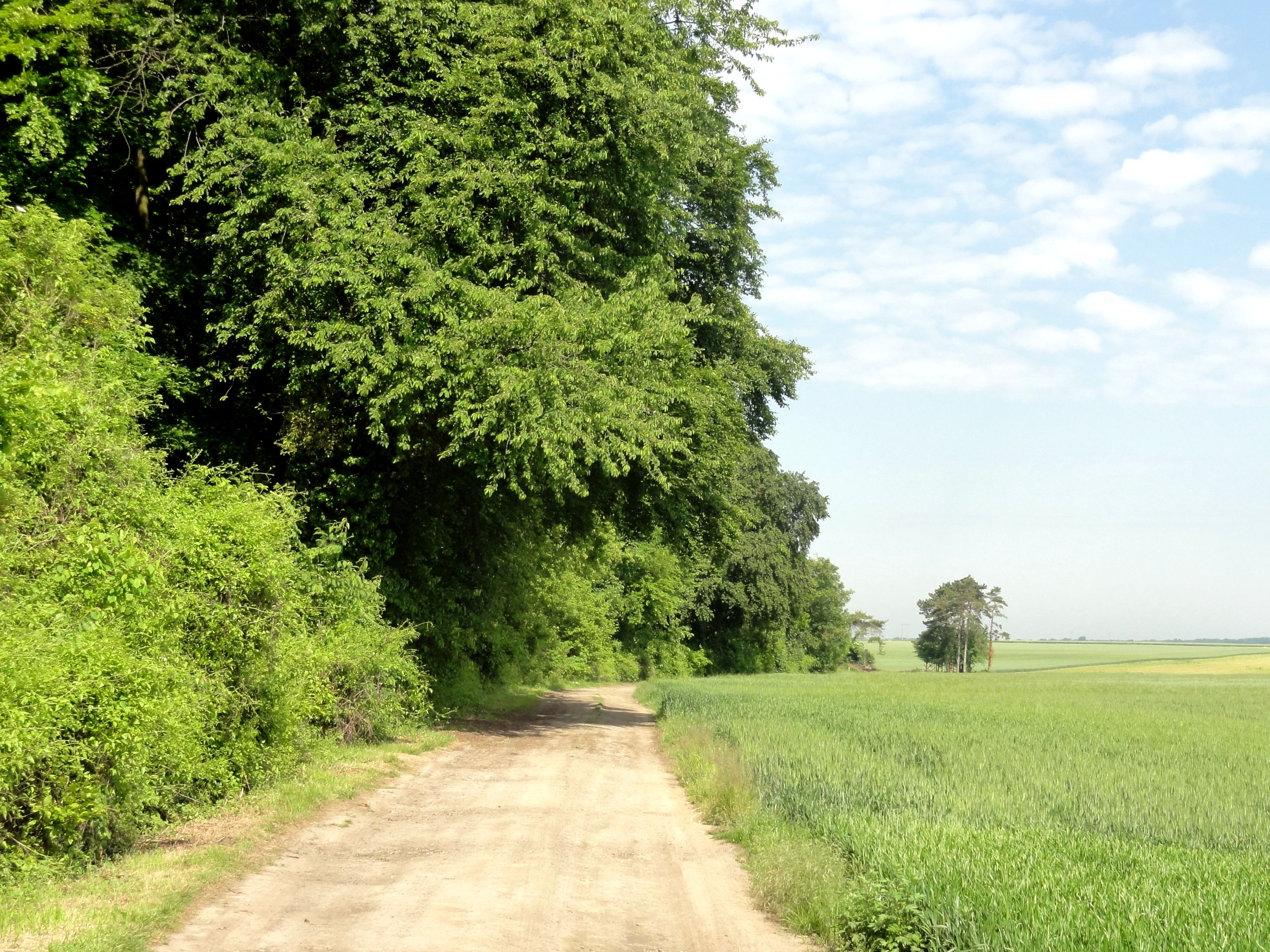 Chemin vicinal ordinaire n° 16 de Beauvais à Senlis.